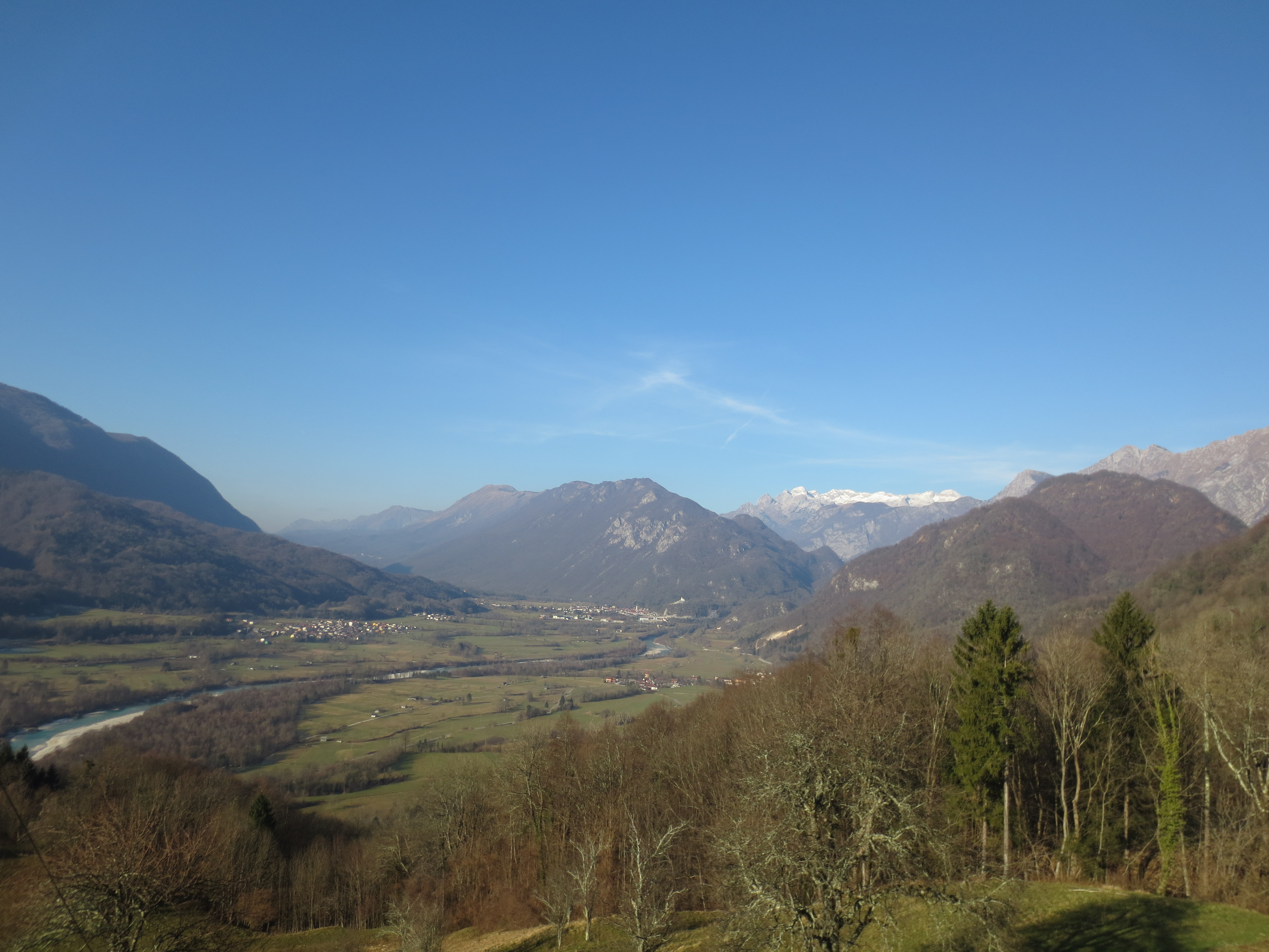 Razgled izpred cerkve Sv. Duha v Libušnjah.